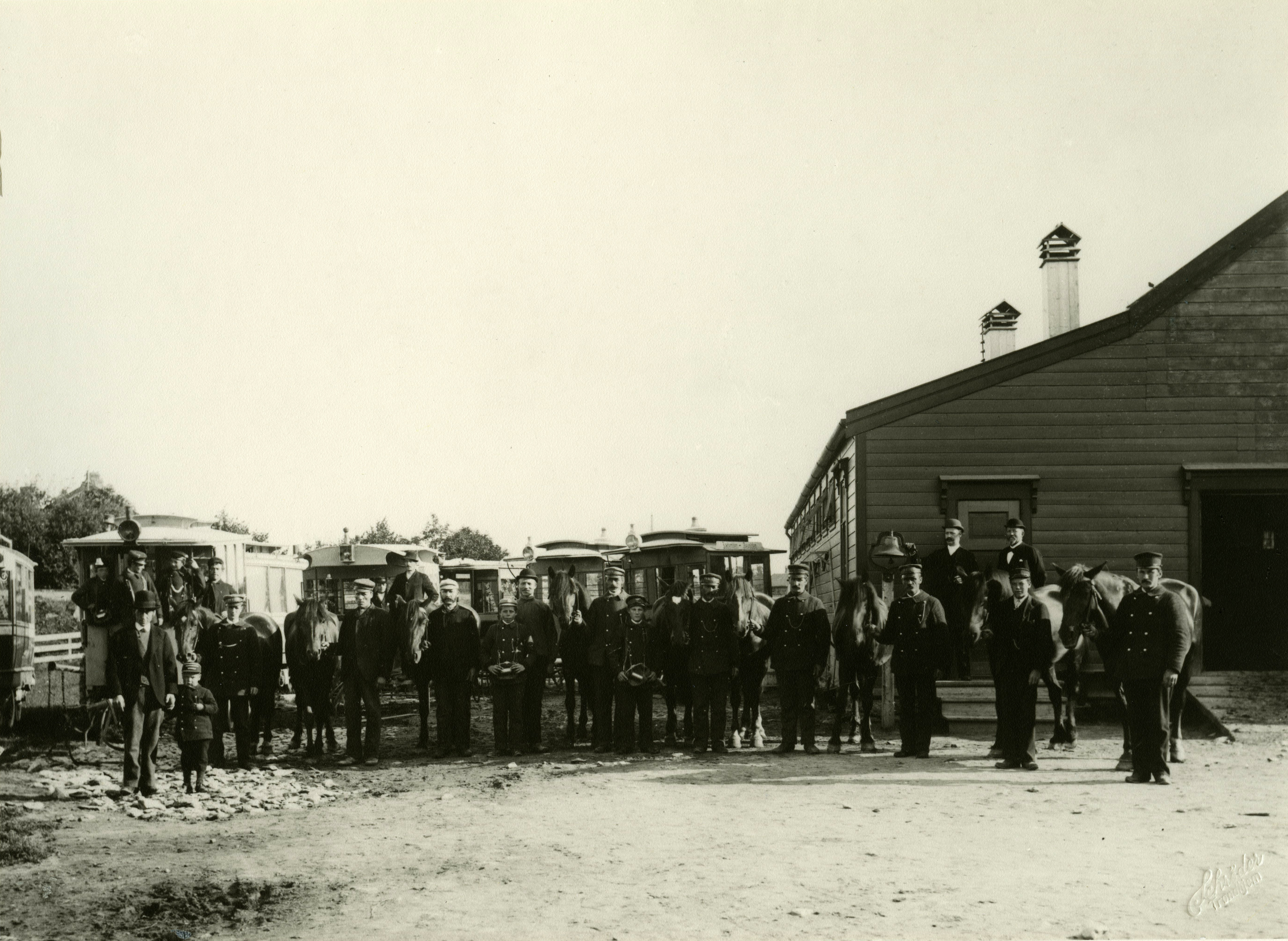 Fotograf: Erik Olsen (1835 - 1920). Format: Fotopositiv. År: 1897. Omnibusstallen på Voldsminde i 1897.